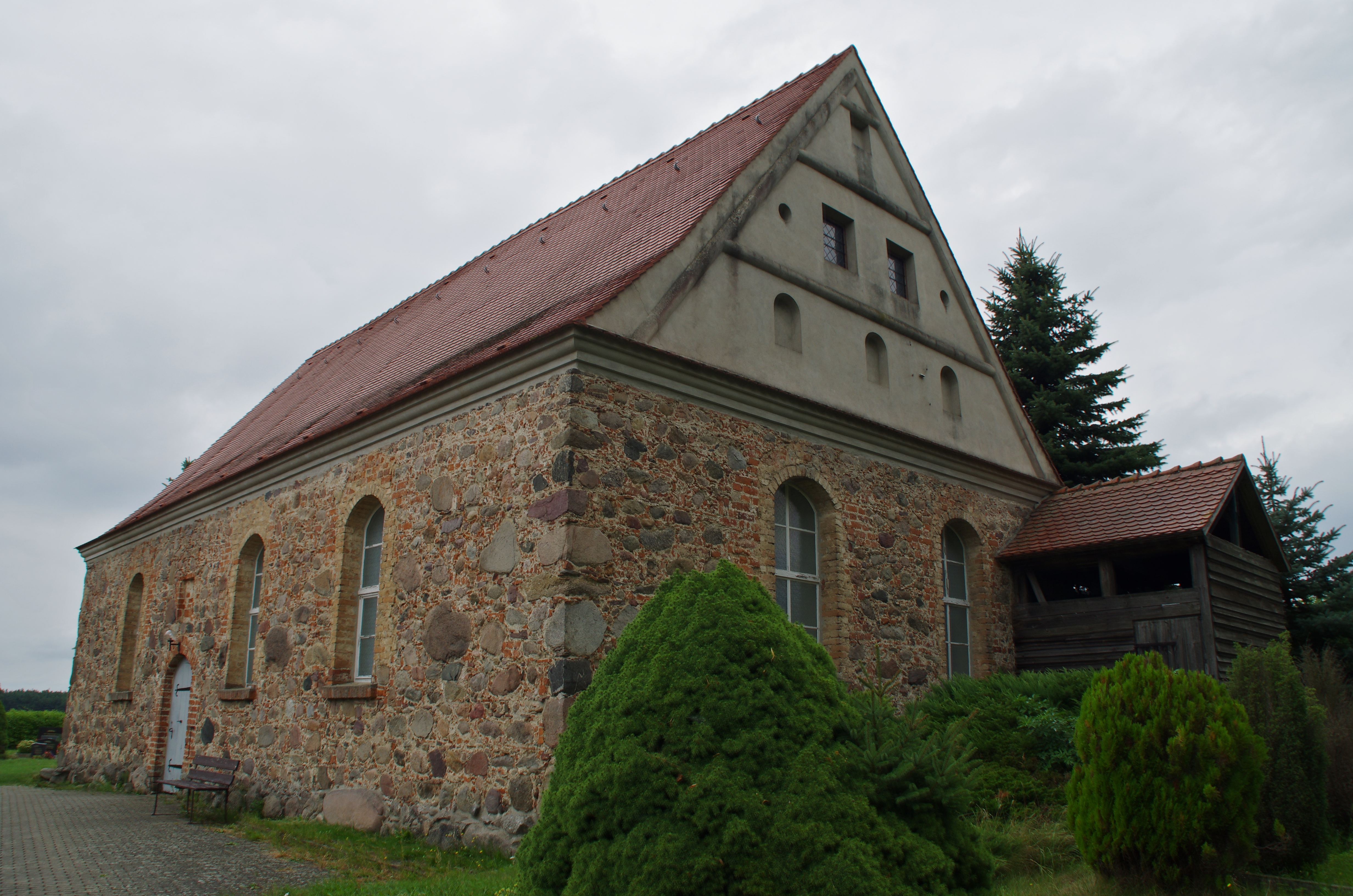 Lindow (Mark) in Brandenburg. Die Kirche in Banzendorf steht unter Denkmalschutz.